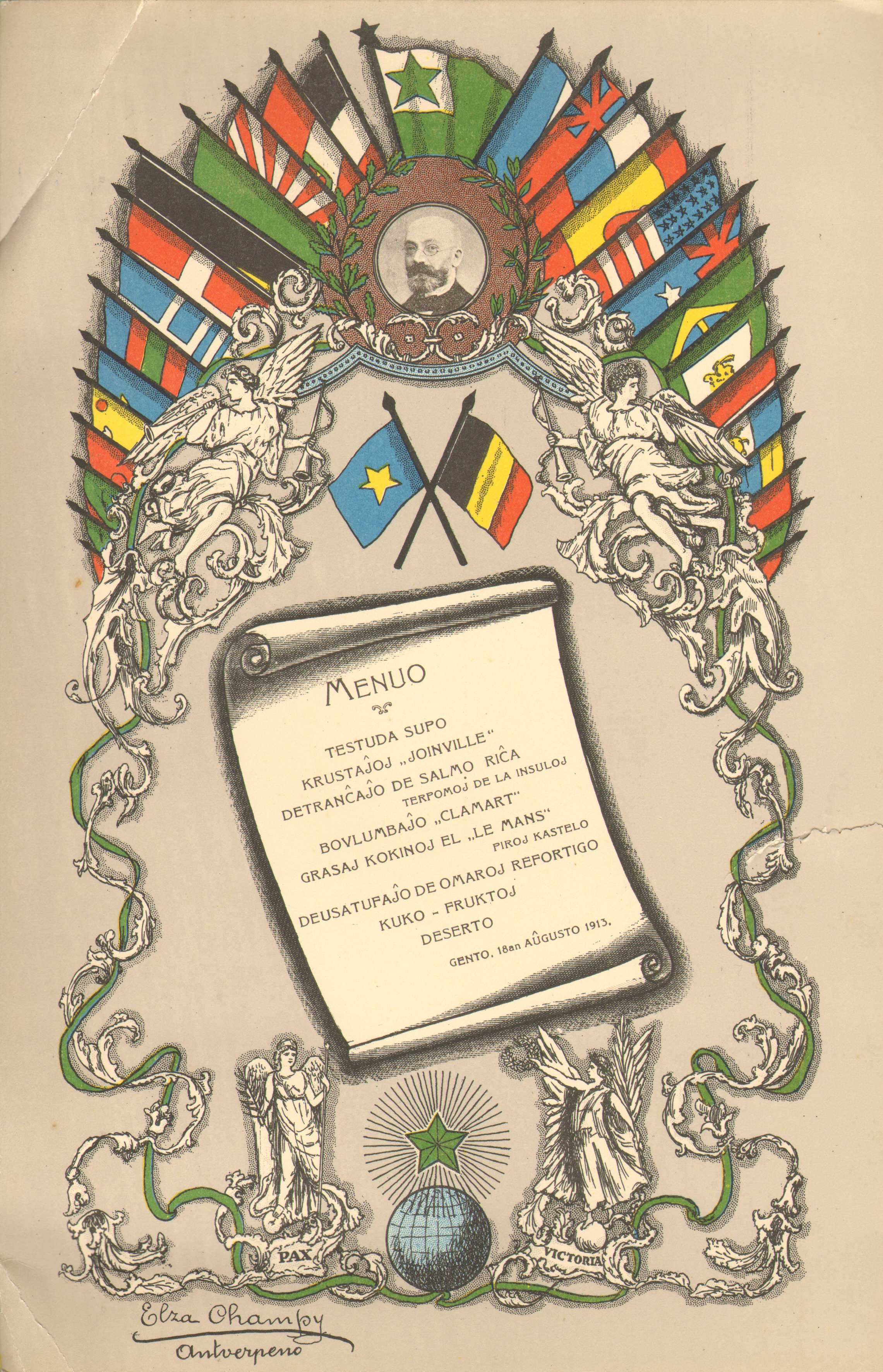 Menuo 1913, 14-20 aŭg. Int. Esperantista Semajno-Kongreso dum la Universala Ekspozicio, Gento /FelixArchief 2233#427, Antwerpeno